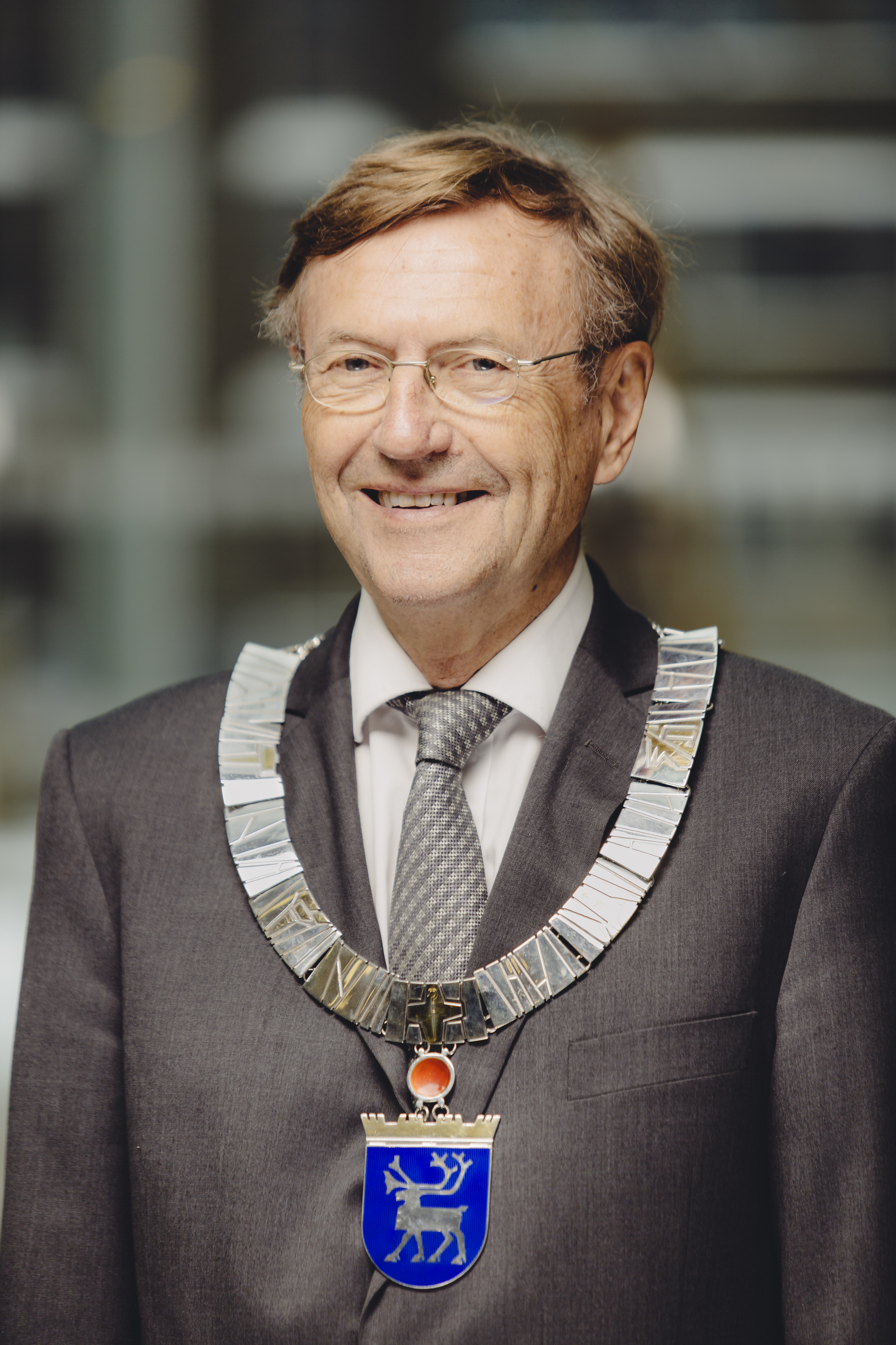 Jarle Aarbakke med ordførerkjede.